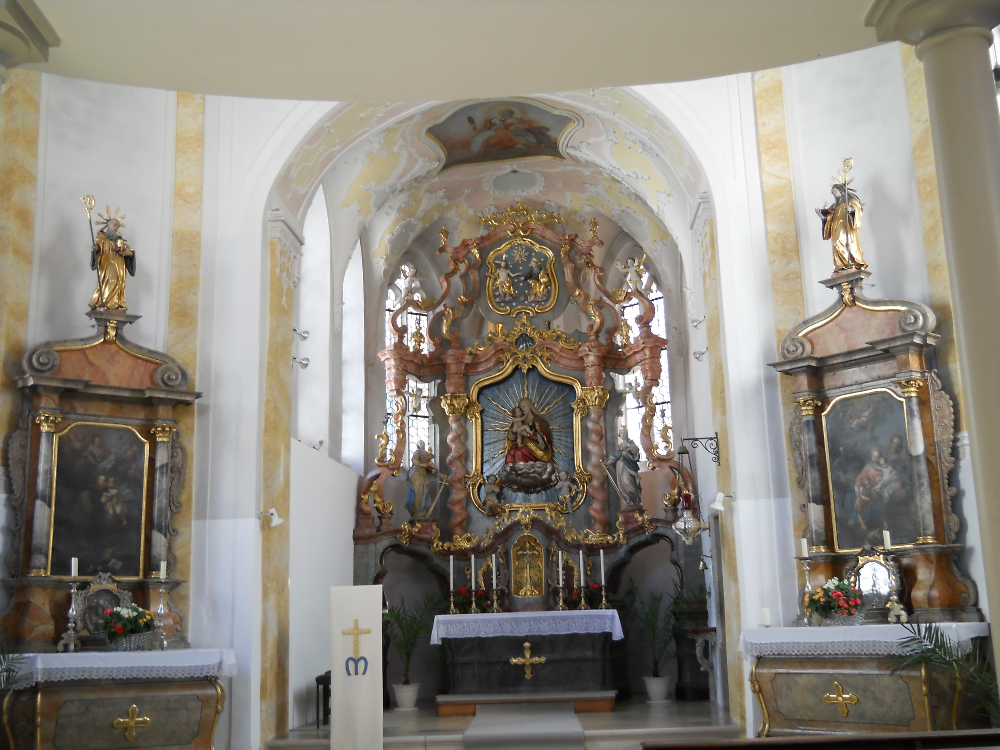 Mariahilf-Kapelle in Eichstätt/Oberbayern: barockes Inneres. Der Altar entstammt der 1948 abgerissenen alten Pfarrkirche St. Vitus in Mühlhausen bei Neustadt an der Donau.